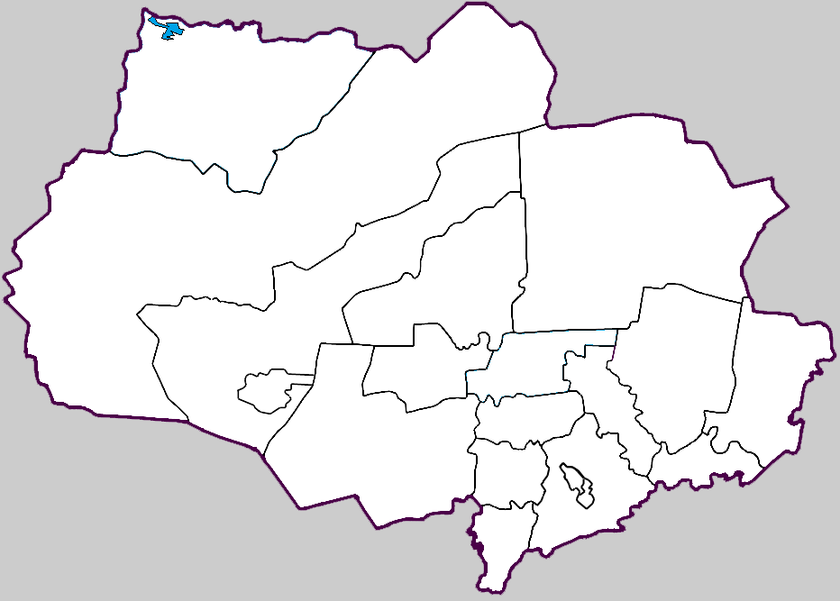 ГО Стрежевой